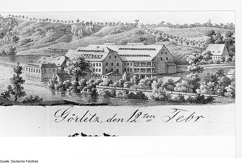 Original image description from the Deutsche Fotothek Görlitz. Obermühle, Briefkopf vom Februar 1845 (Stadtarchiv Görlitz, Bildersammlung)